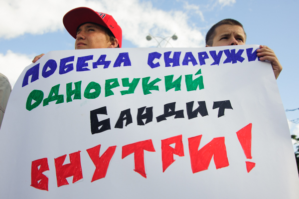 митинг против игорных заведений